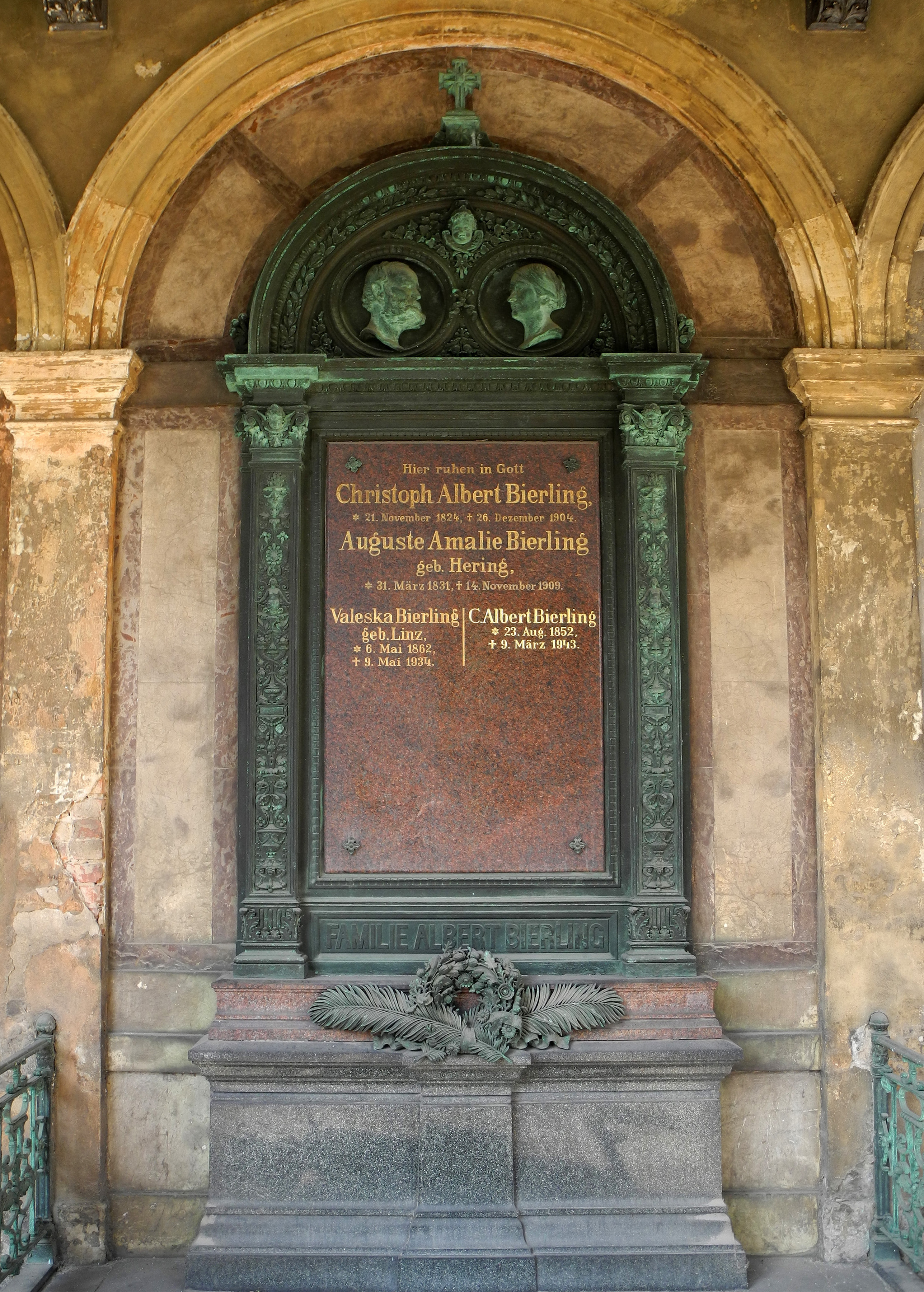 Neuer Annenfriedhof (Löbtau-Naußlitzer Friedhof „Friede und Hoffnung“) – als Sachgesamtheit unter Denkmalschutz; Grabanlage der Glockengießer-Familie Christoph Albert Bierling (1824–1904) und dessen Sohn C. Albert Bierling (1852–1943) (rechts im Eingangsbereich).